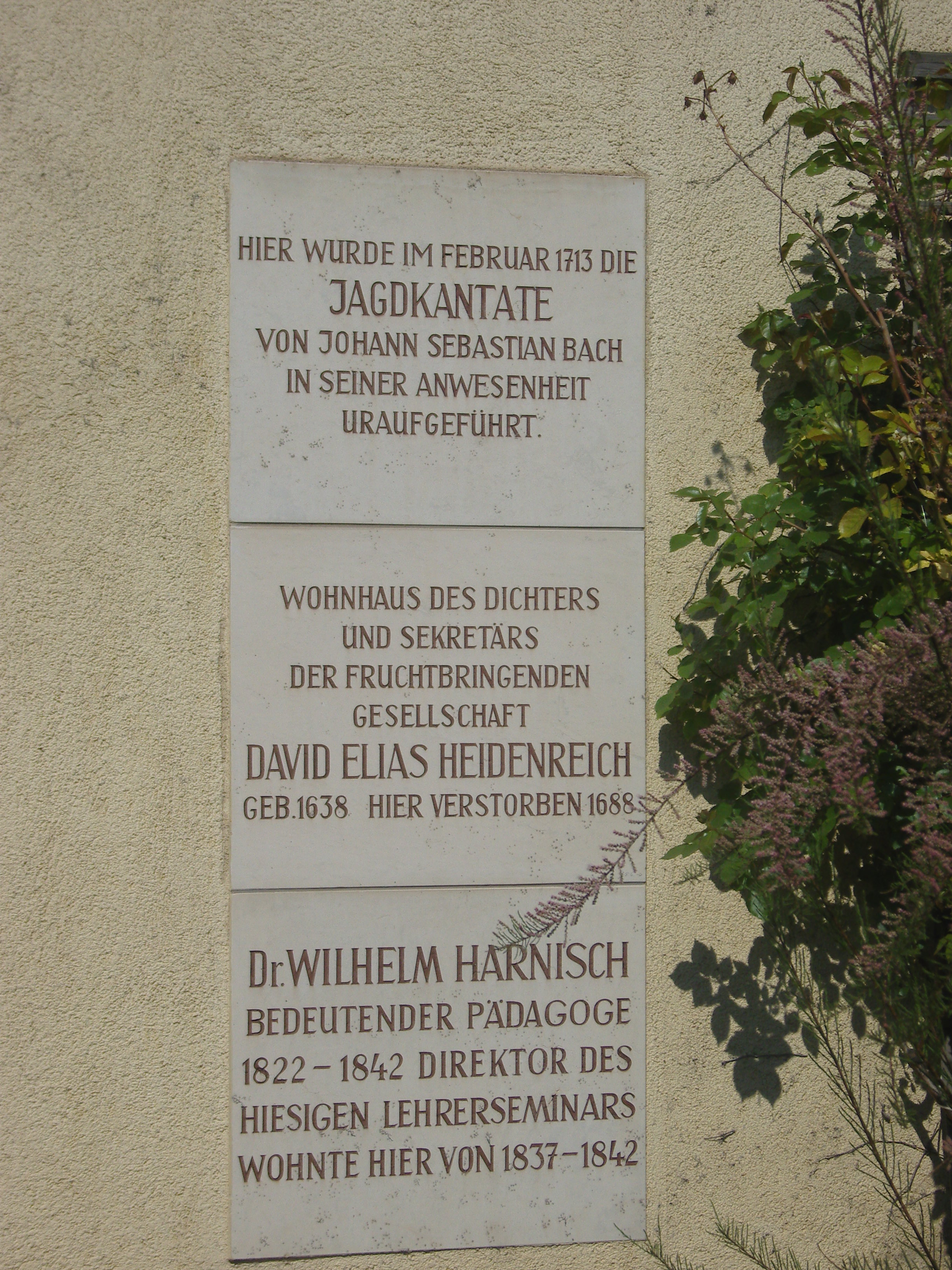 Gedenktafeln am Jägerhof in Weißenfels; Gedenktafeln an die Uraufführung der Jagdkantate von Johann Sebastian Bach; an David Elias Heidenreich und an den Pädagogen Wilhelm Harnisch